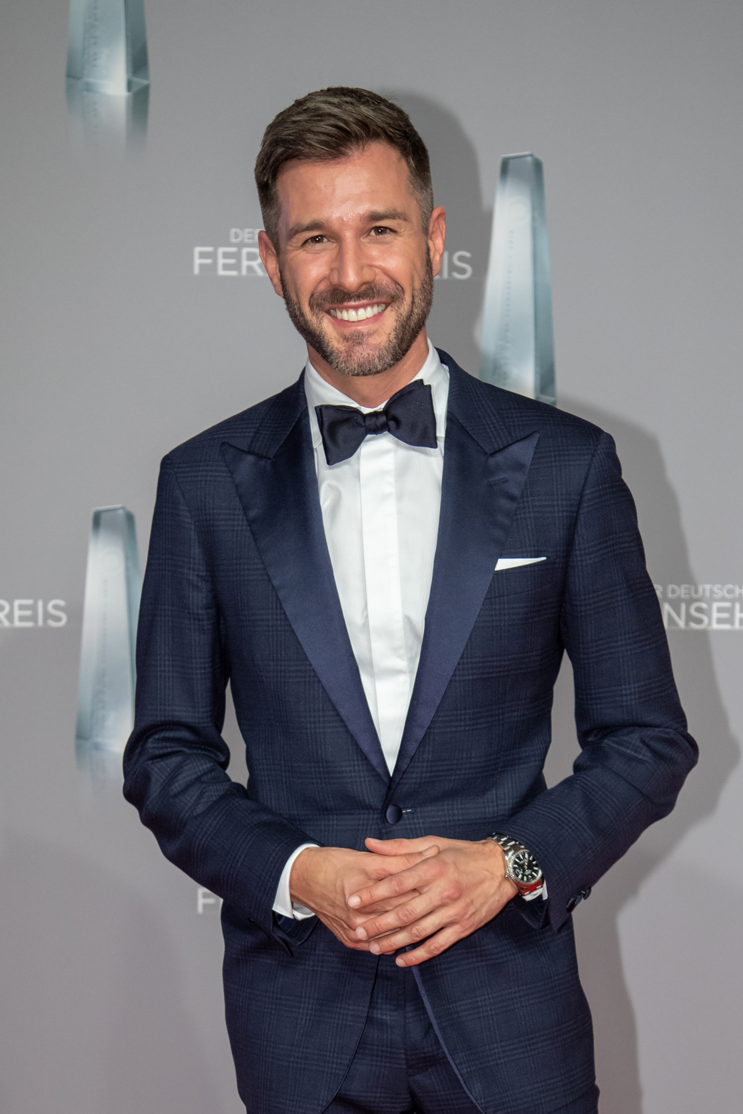 Jochen Schropp beim Deutschen Fernsehpreis 2019 in der Düsseldorfer Rheinterrasse